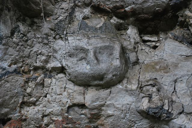 10.000 Jahre altes Gesicht, graviert in Stein in der Höhle Lene Hara